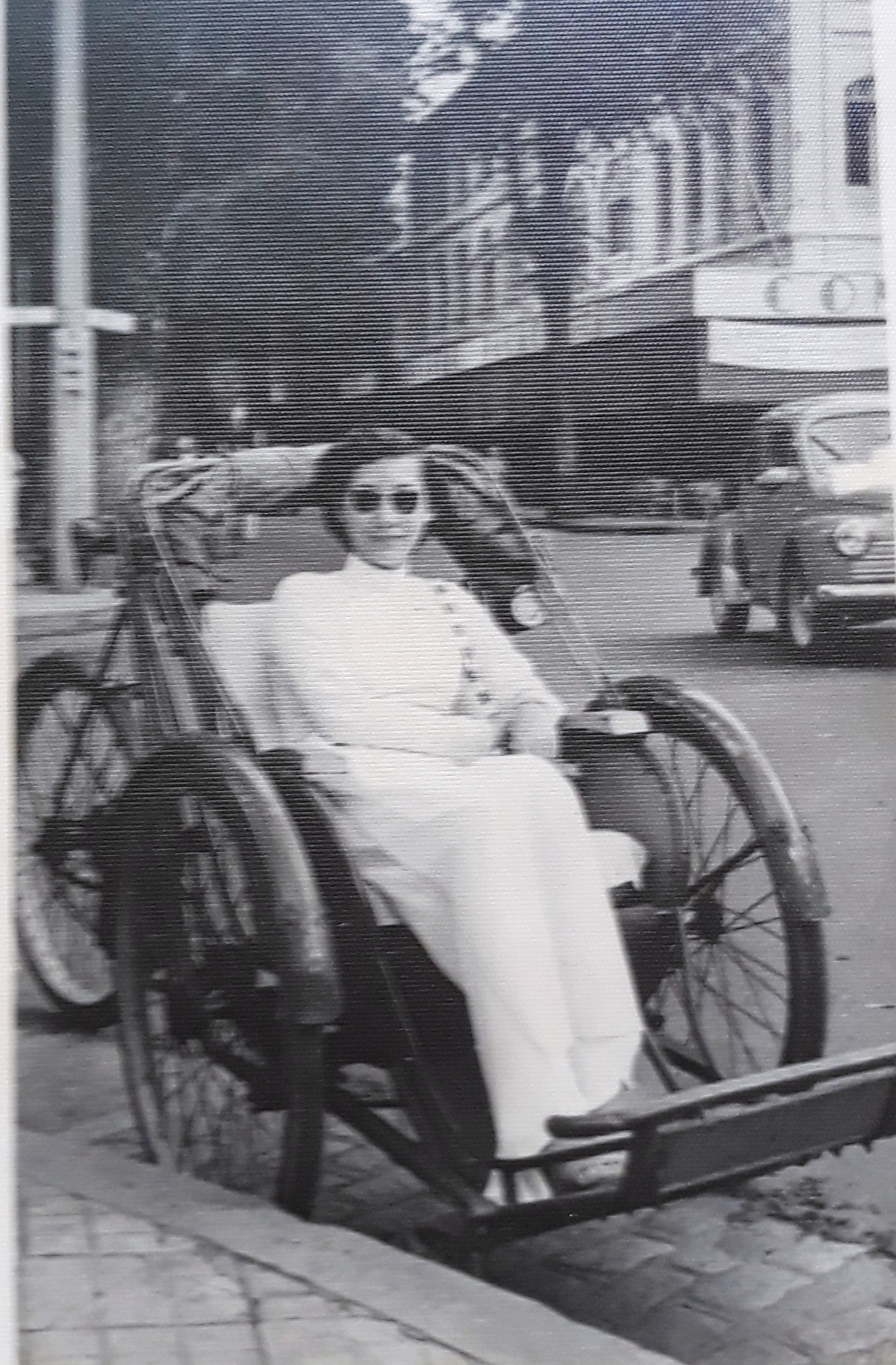 Xich lô Saigon55